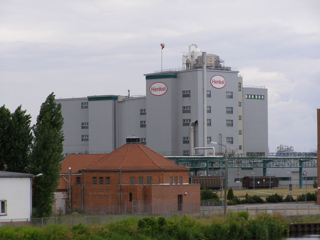 Hauptgebäude Henkel-Werk Genthin, im Vordergrund der Elbe-Havel-Kanal